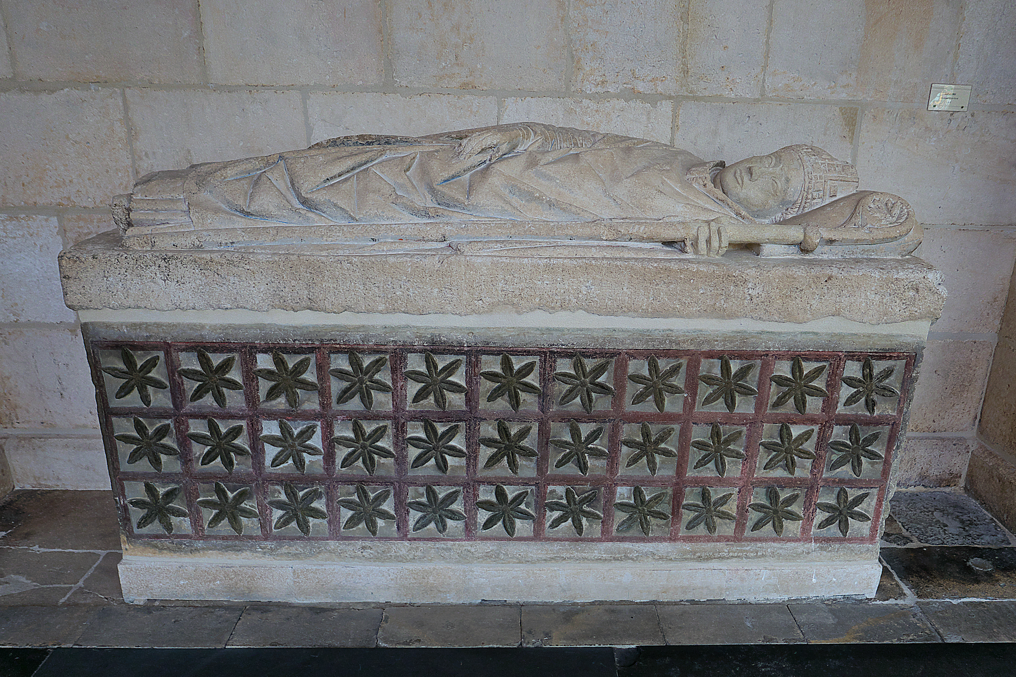 Claustro de la Catedral de Burgos. Sepulcro del obispo Mateo Reynal (1258-1259).